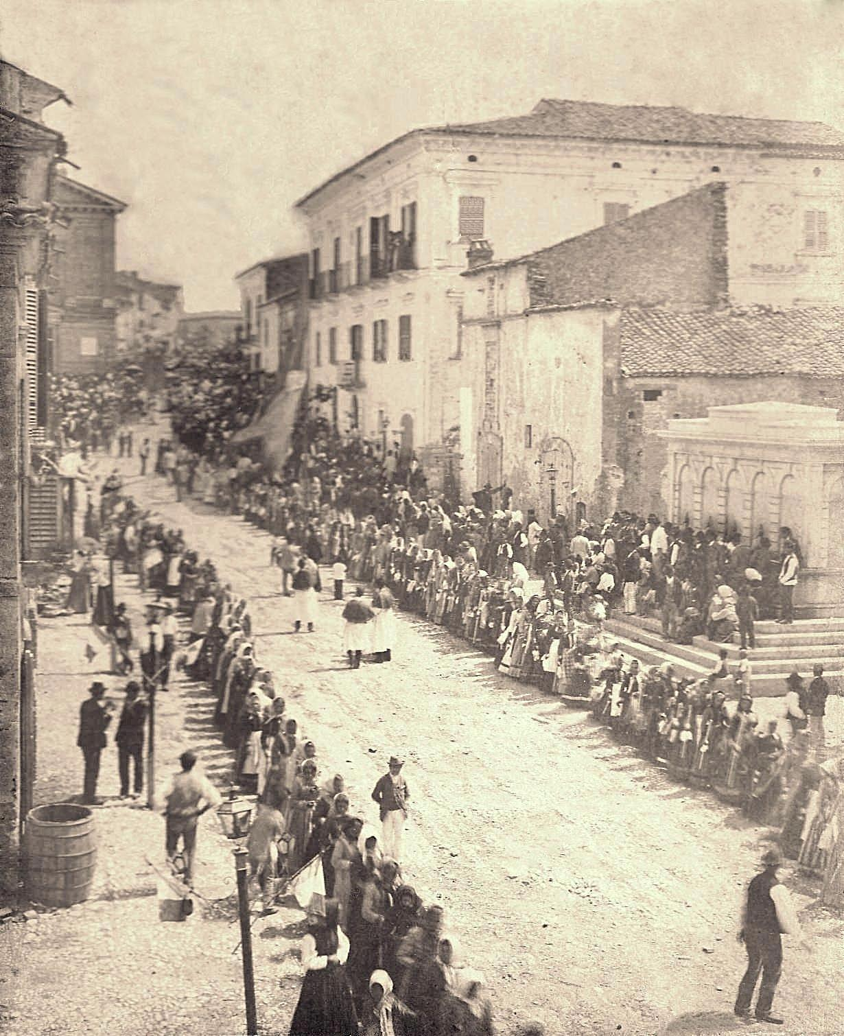 1890 Fossacesia - processione davanti alla Fontana delle cinque cannelle